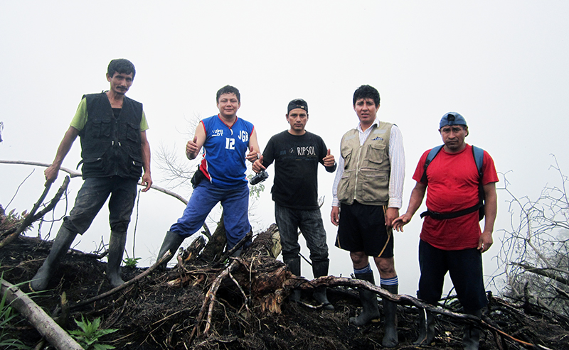 Equipo de Explora Uchiza en Bélgica